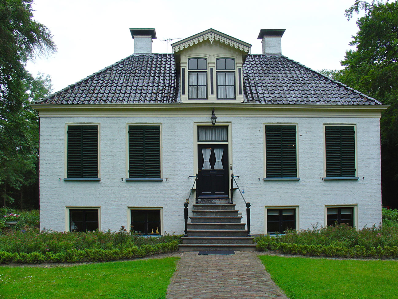 Huis Westerbeek in Frederiksoord - het huidige hoofdkantoor van de Maatschappij van Weldadigheid